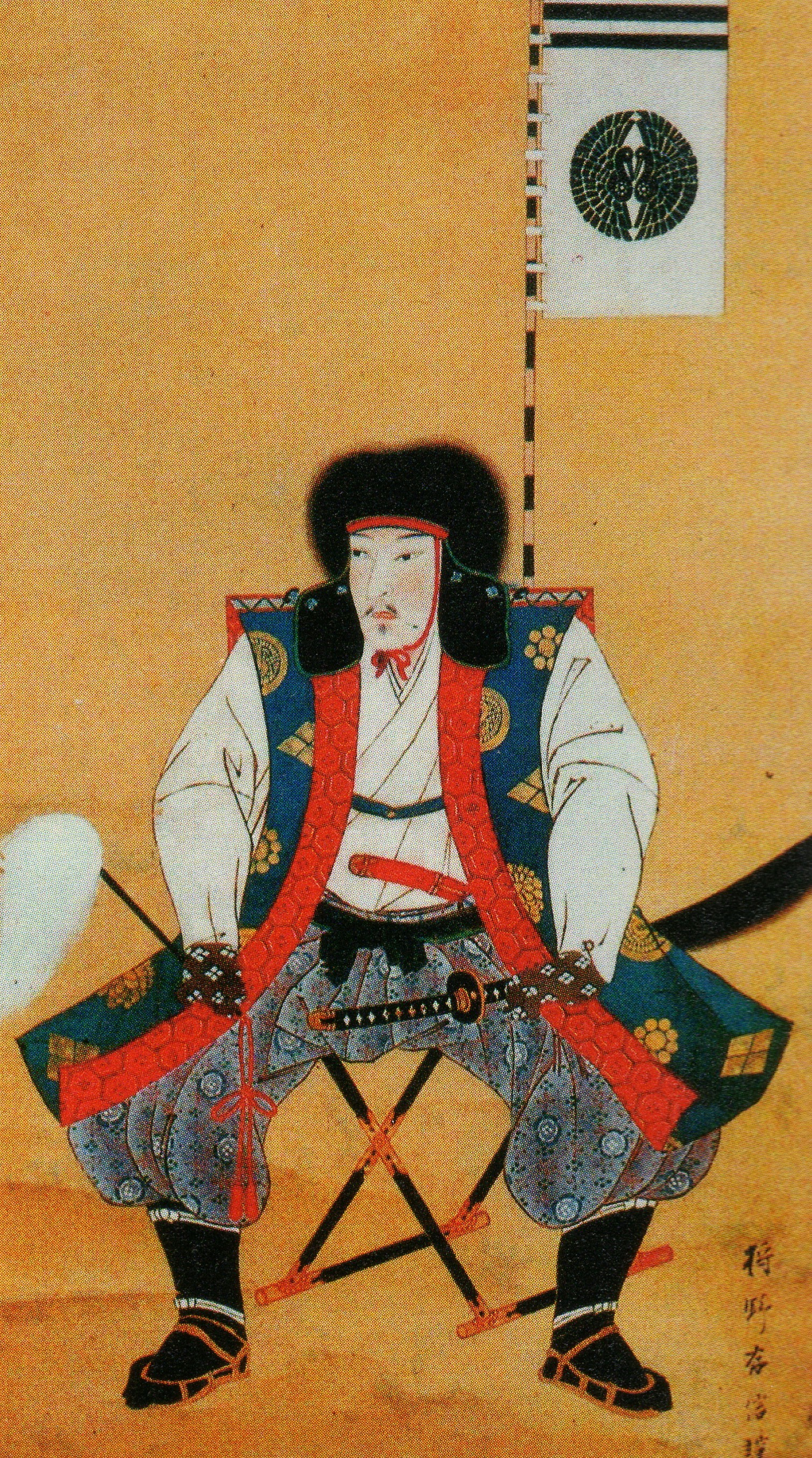 楢山佐渡の肖像。